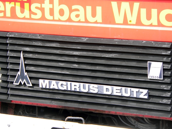 Эмблема Magirus-Deutz - IVECO